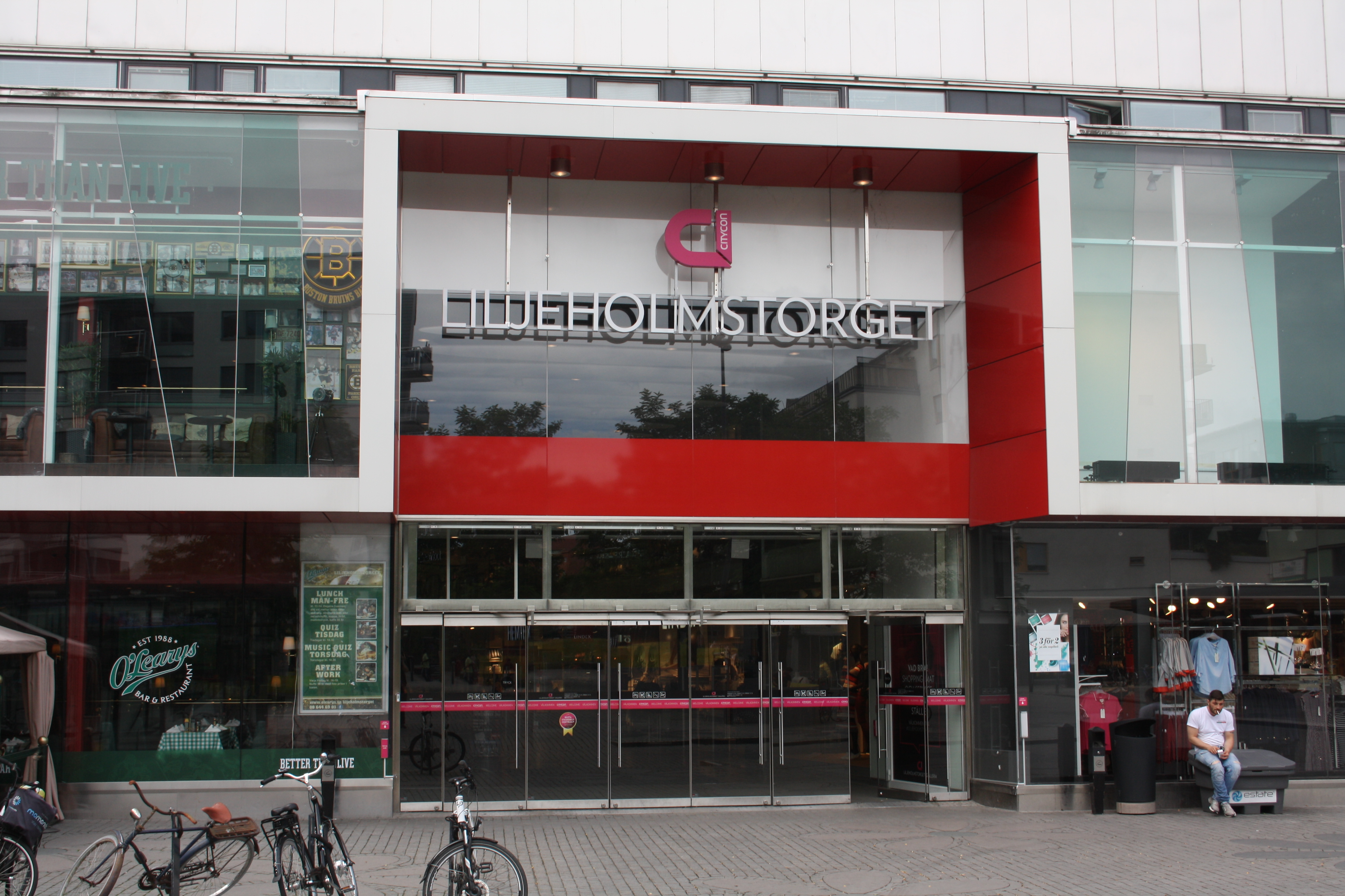 Liljeholmstorget juli 2016